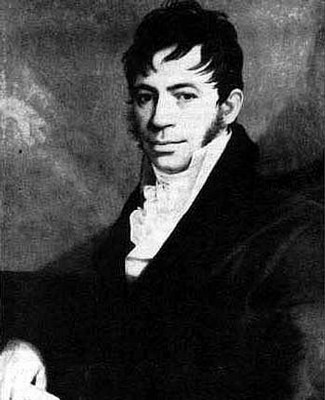 Der tschechische Erfinder Josef Božek (1782-1835)